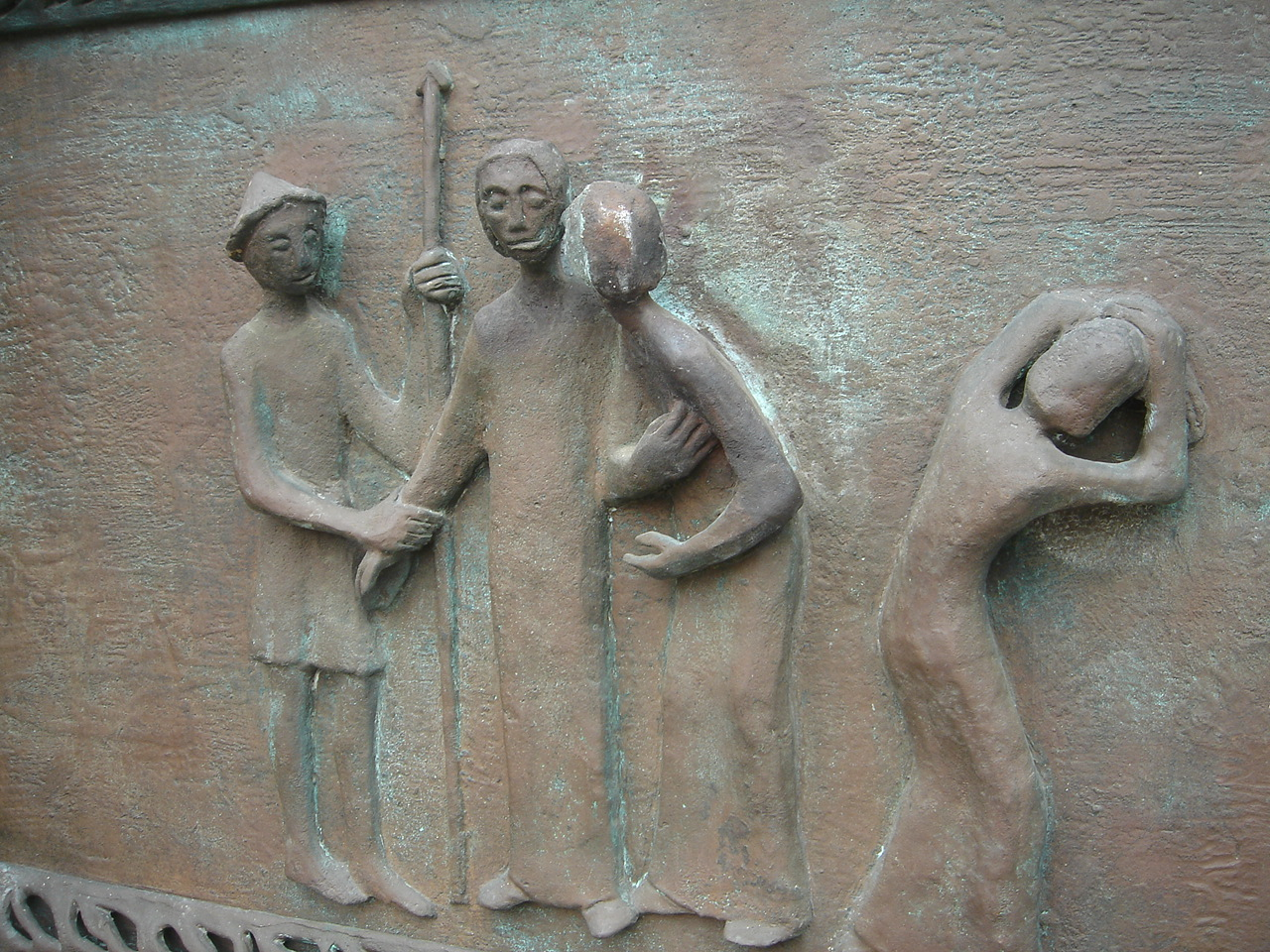 Reformationskirche Hilden, Bronzeportal, Künstler: Ulrich Henn (1925-2014), Detail: Dargestellt ist der Verrat Christi.